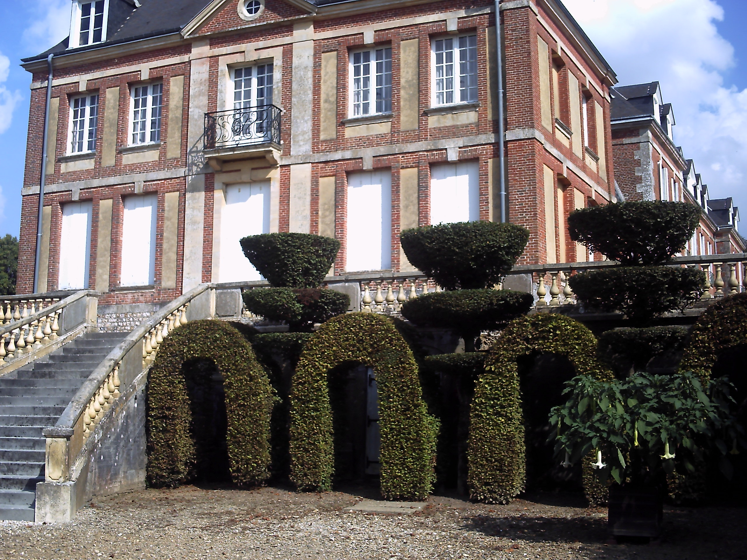 facade est